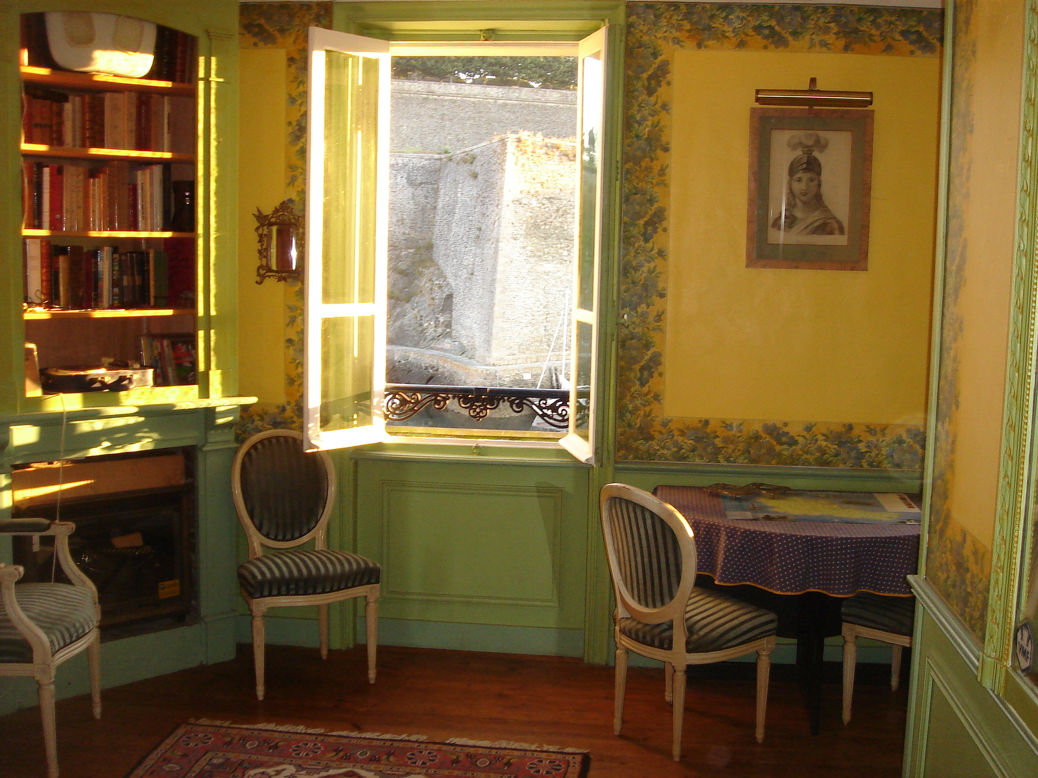 Vue intérieure d'une maison donnant sur le port de palais (56), contre-jour.